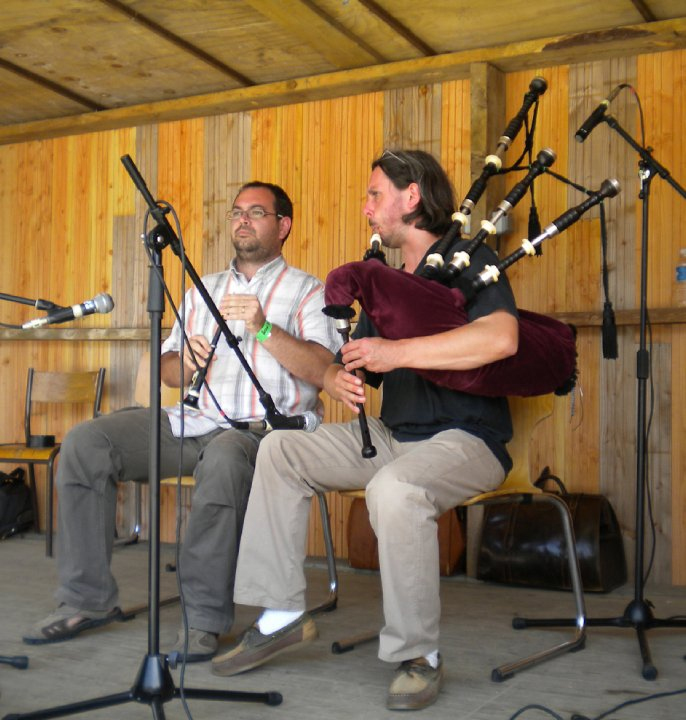 Festival Plin 2009